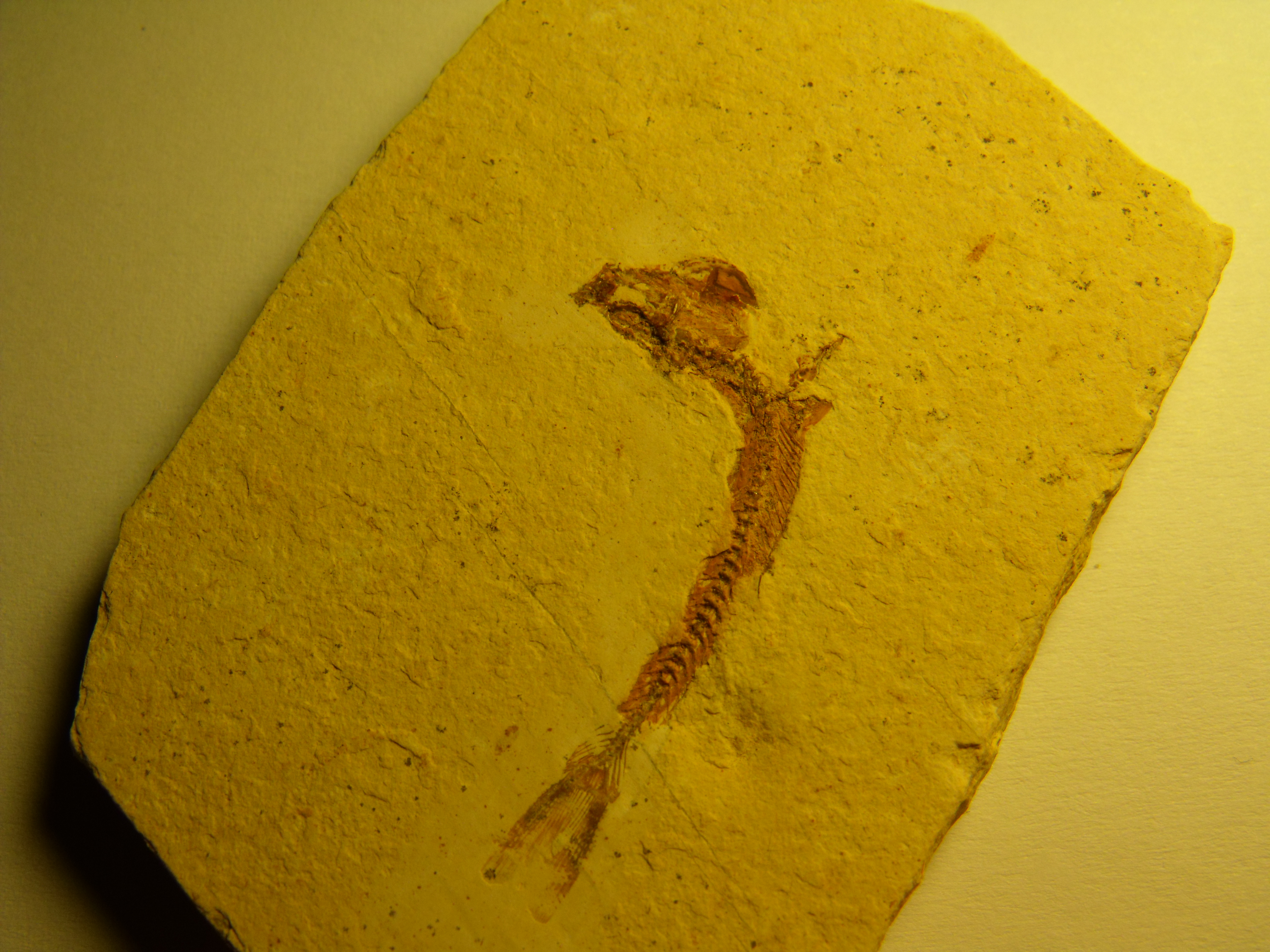 Dastilbe aus Brasilien. Circa 110 Millionen Jahre alt. 5 Zentimeter lang.